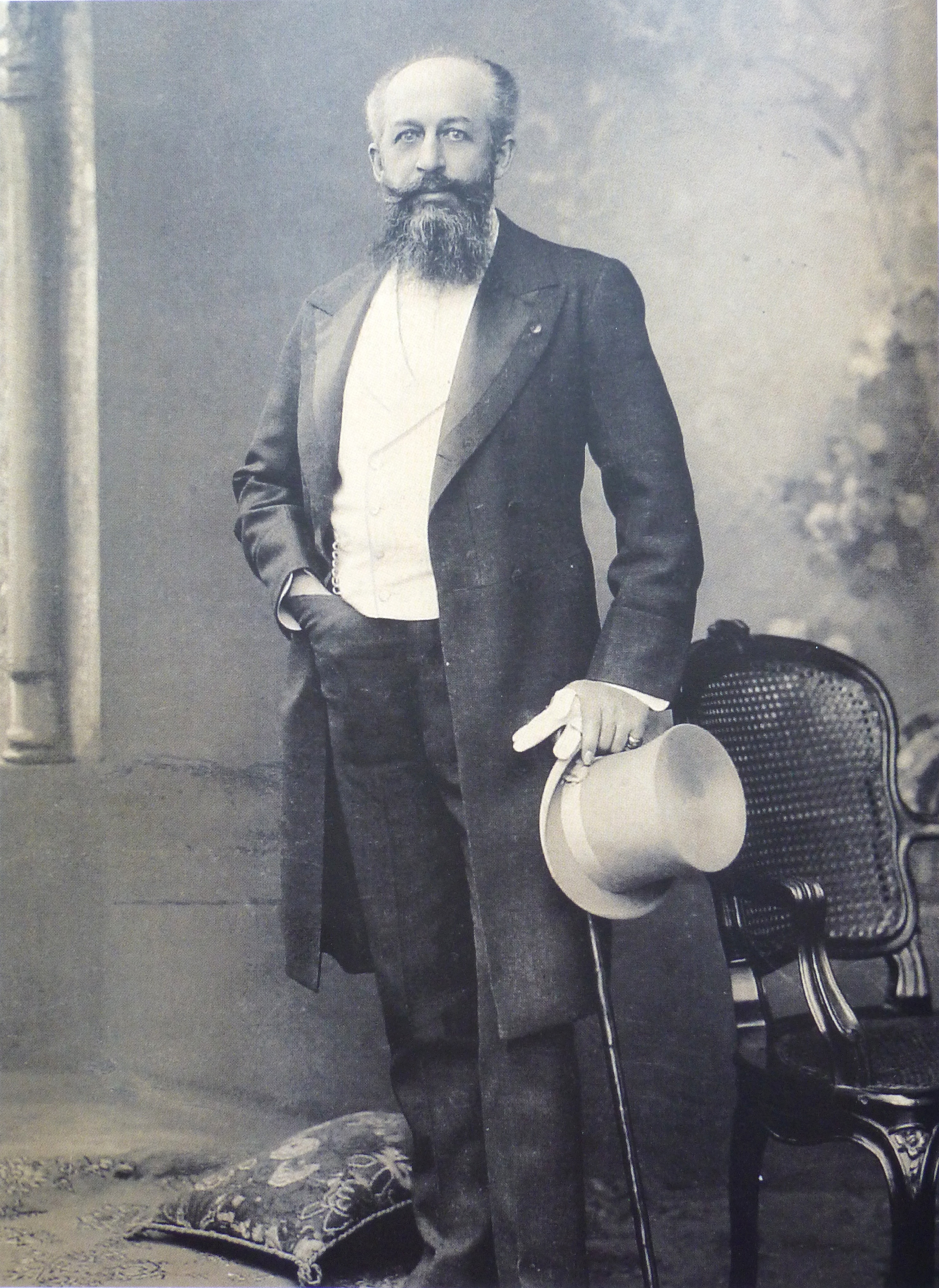 Photographie par Nadar de Georges Nagelmackers (1845-1905), créateur de l'Orient-Express et de la Compagnie des Wagons-Lits.